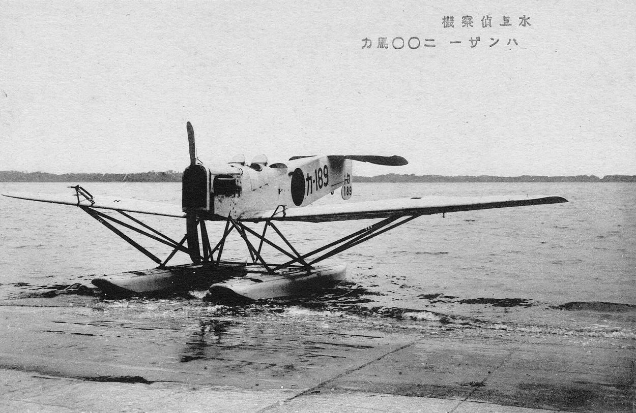 霞ヶ浦航空隊所属のハンザ式水上偵察機。